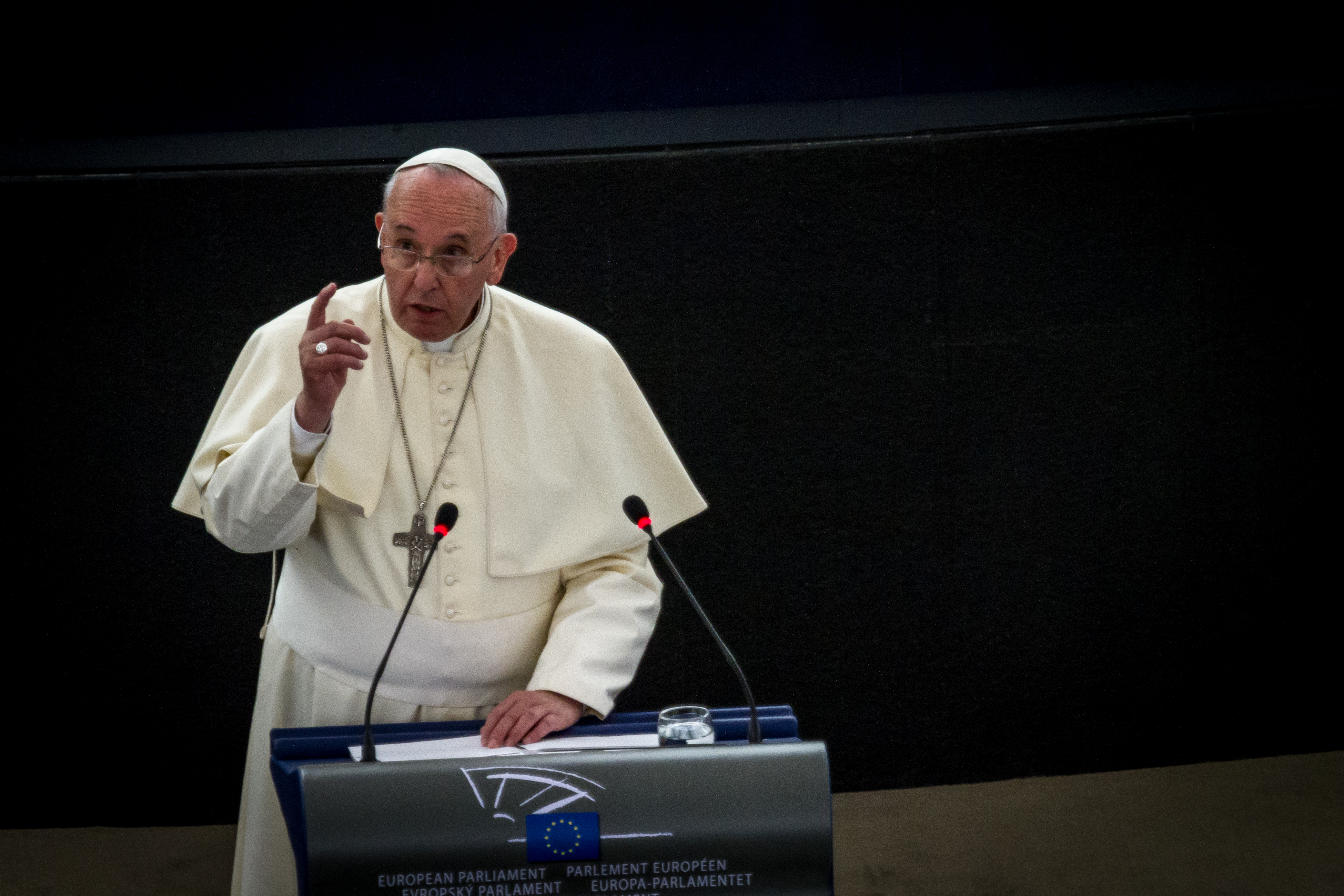 Visite du pape François au Parlement européen de Strasbourg.